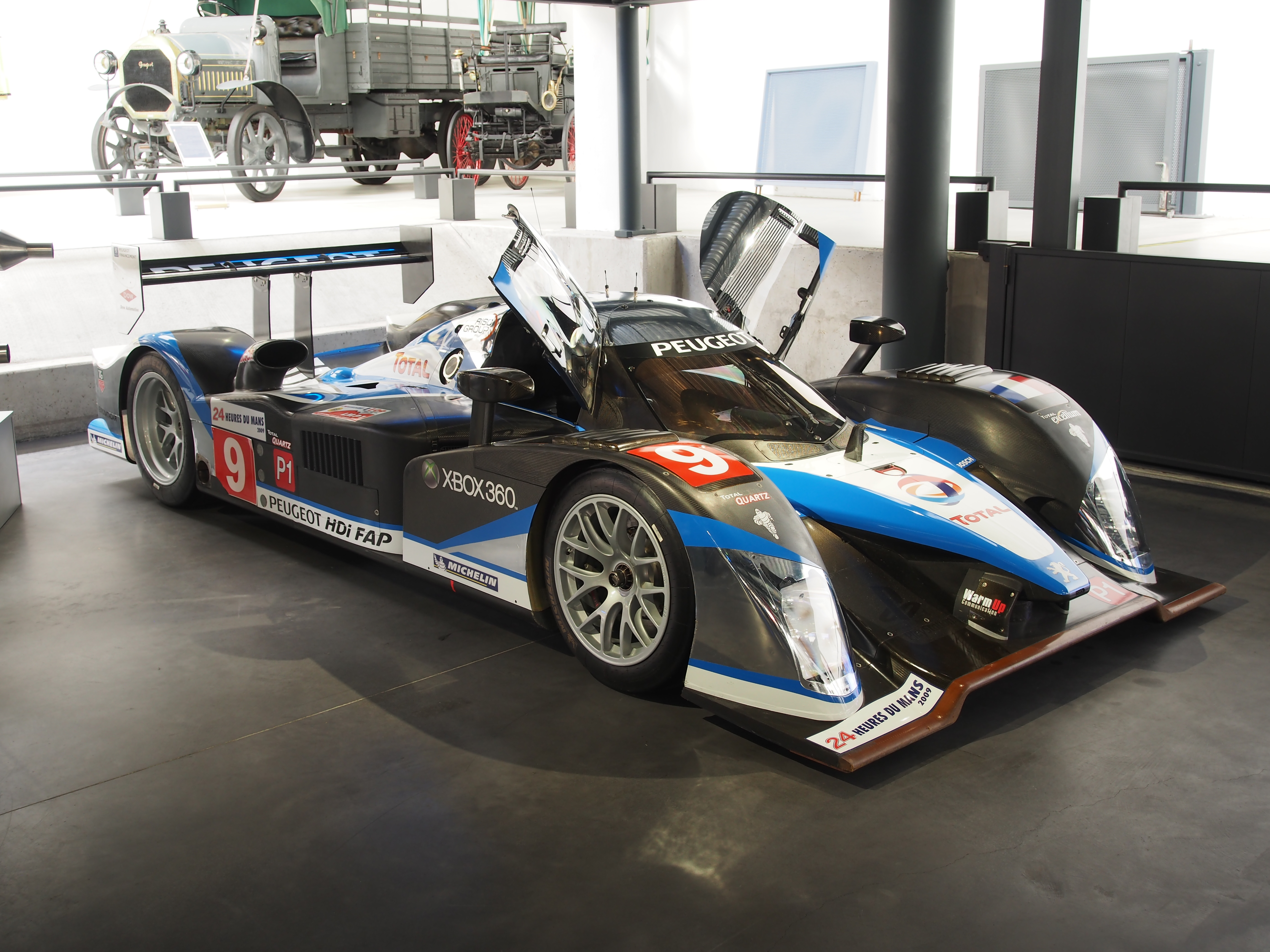 Photographed at the Musée de l'Aventure Peugeot-Sochaux, France.